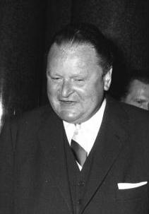 Das Bild zeigt den damaligen Zweiten Bürgermeister der Freien und Hansestadt Hamburg Edgar Engelhard (FDP) bei der Begrüßung des zypriotischen Präsidenten Erzbischof Makarios III am 25. Mai 1962 in Hamburg. Es ist ein Ausschnitt aus dem Bild File:Bundesarchiv B 145 Bild-F013042-0002, Hamburg, Staatsbesuch Präsident von Zypern.jpg.